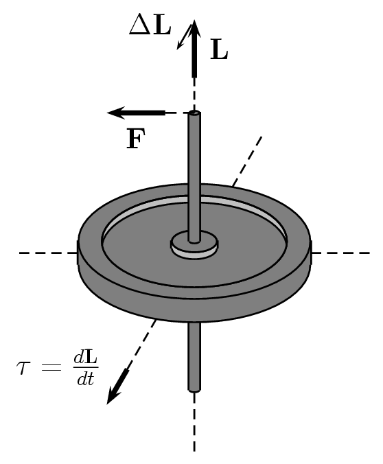 Giroszkóp működési elve. A kép előállításához használt forrás (LaTeX + PSTricks): lásd lent